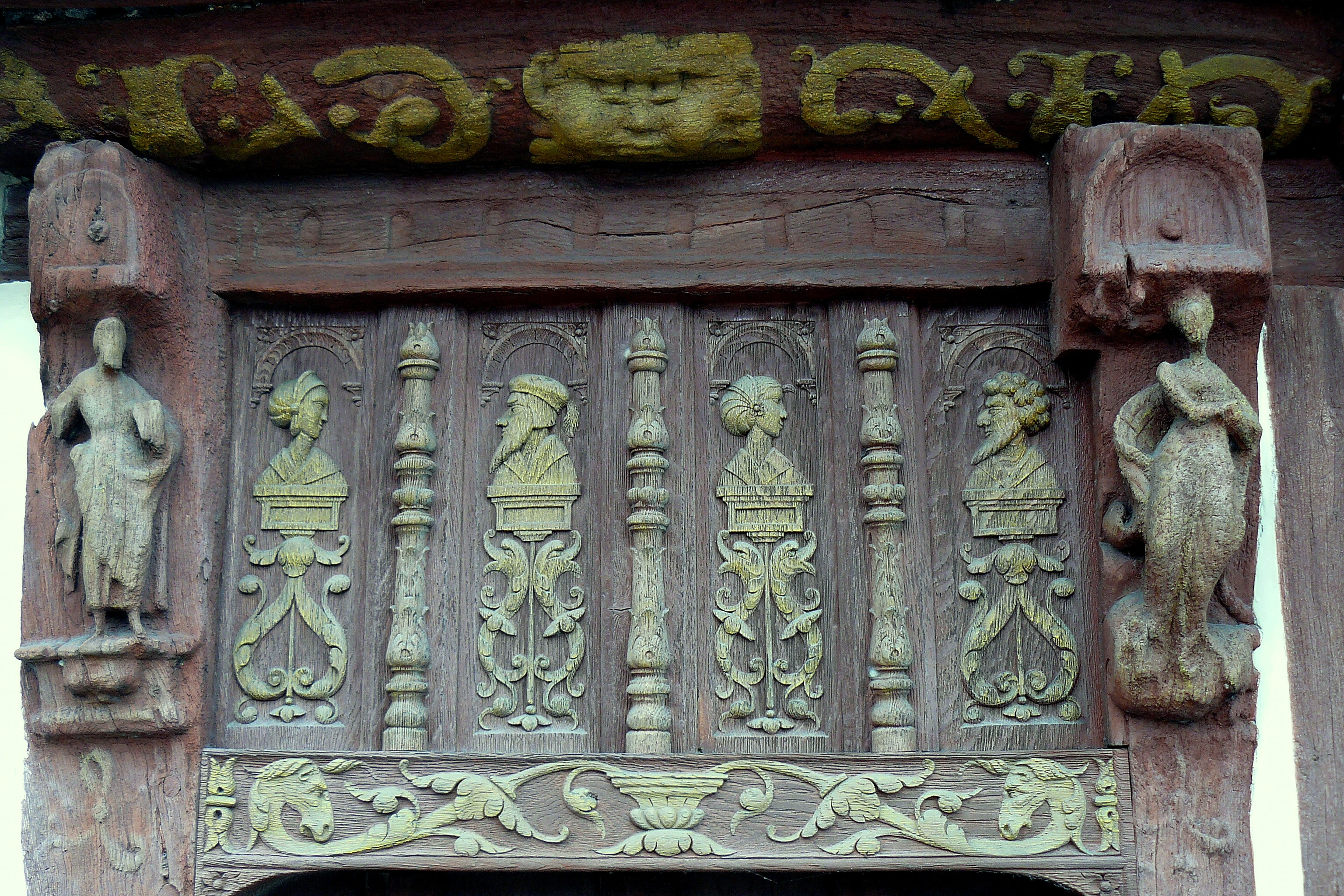 La maison dite "Henri IV" (XVIe siècle) à Saint-Valery-en-Caux, détail (Seine-Maritime, France)